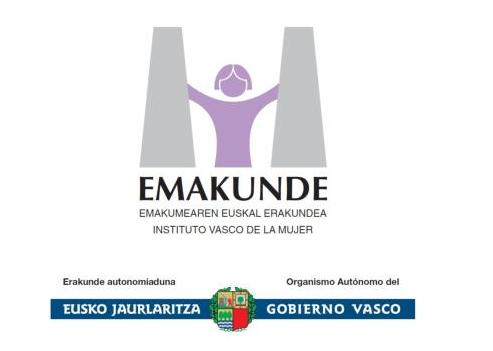 2017ko Emakunde ikerketa bekaren ondorioz sortutako liburua. Lizentzia librean egileek emanda.